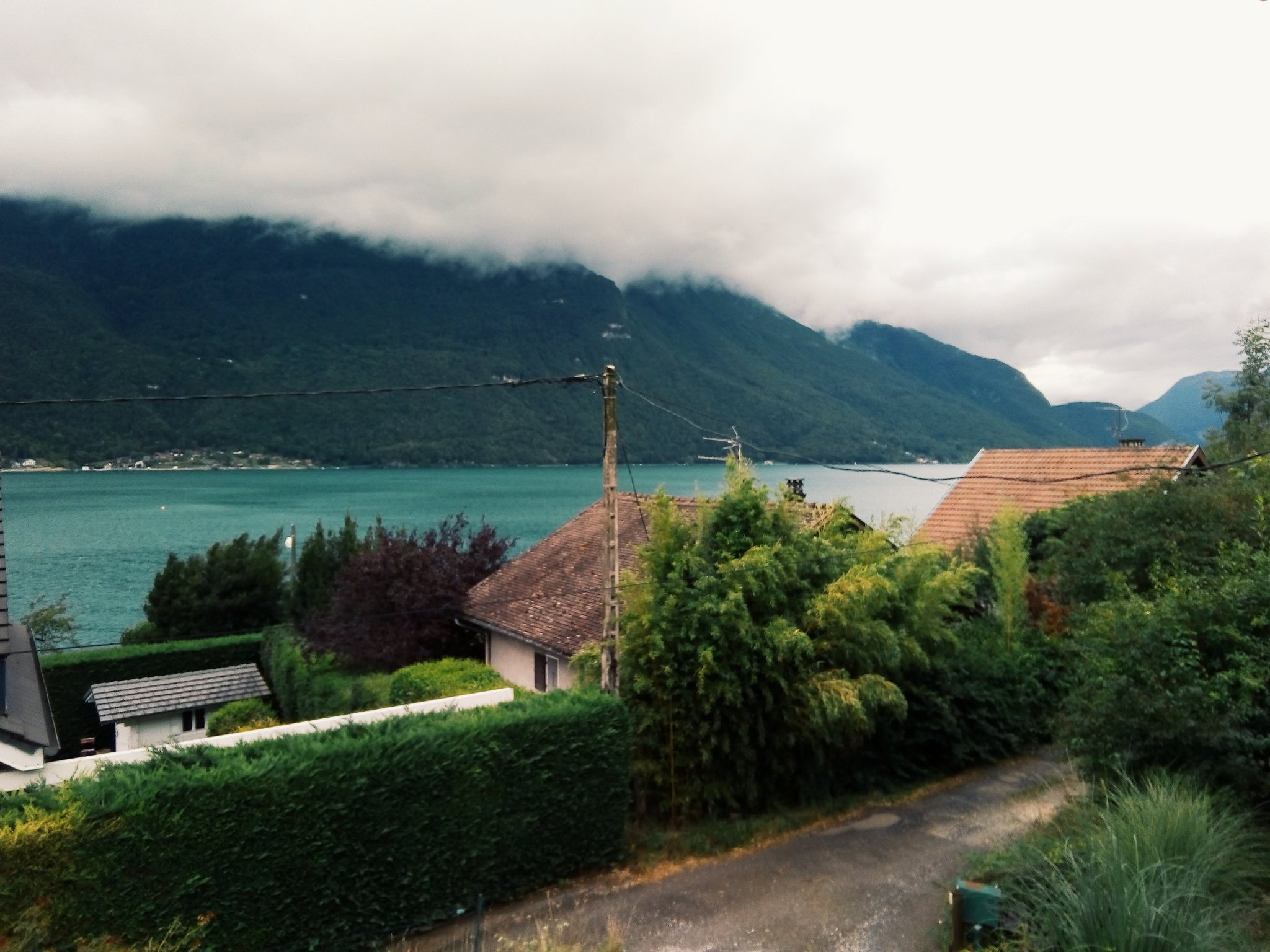 Vista del lago de Annecy, Francia, en la región de Los Alpes. Comuna de Doussard